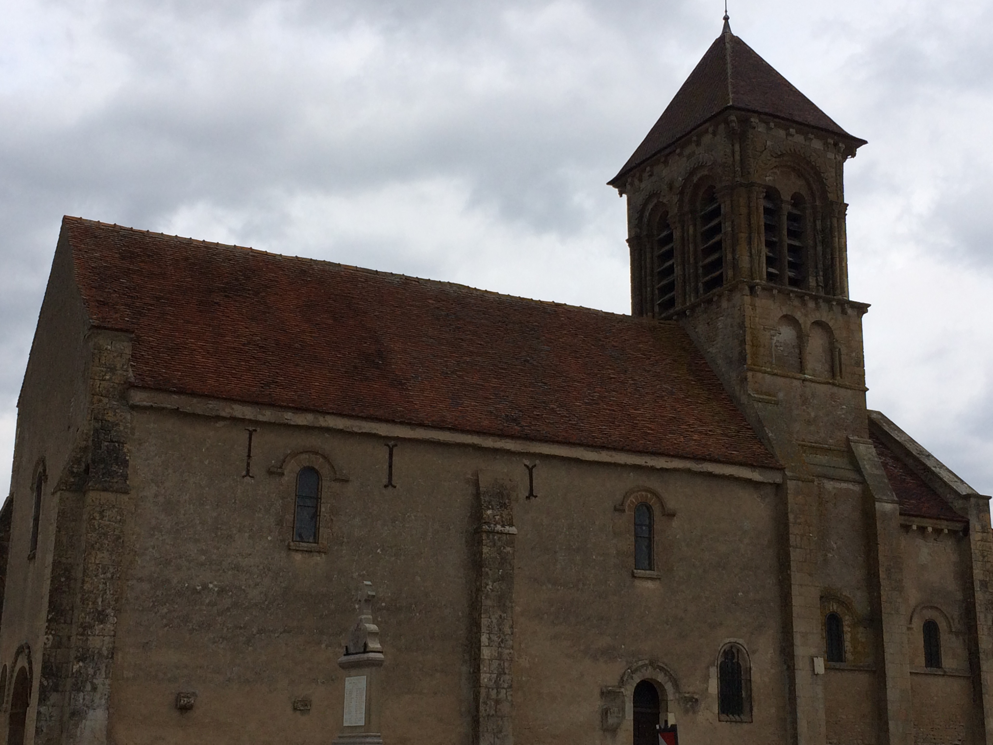 L'église au centre du village.